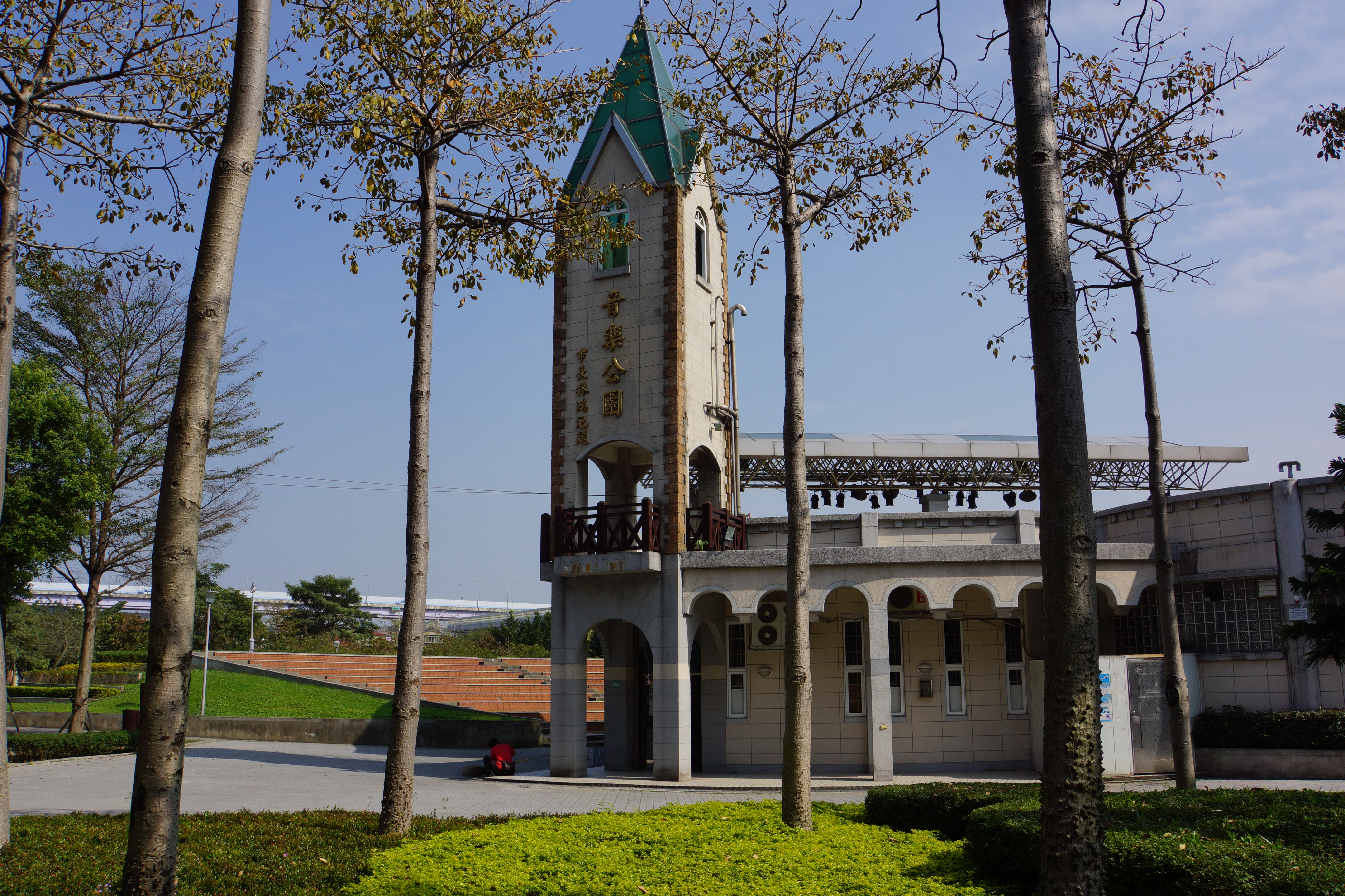 板橋音樂公園 Music Park Banqiao